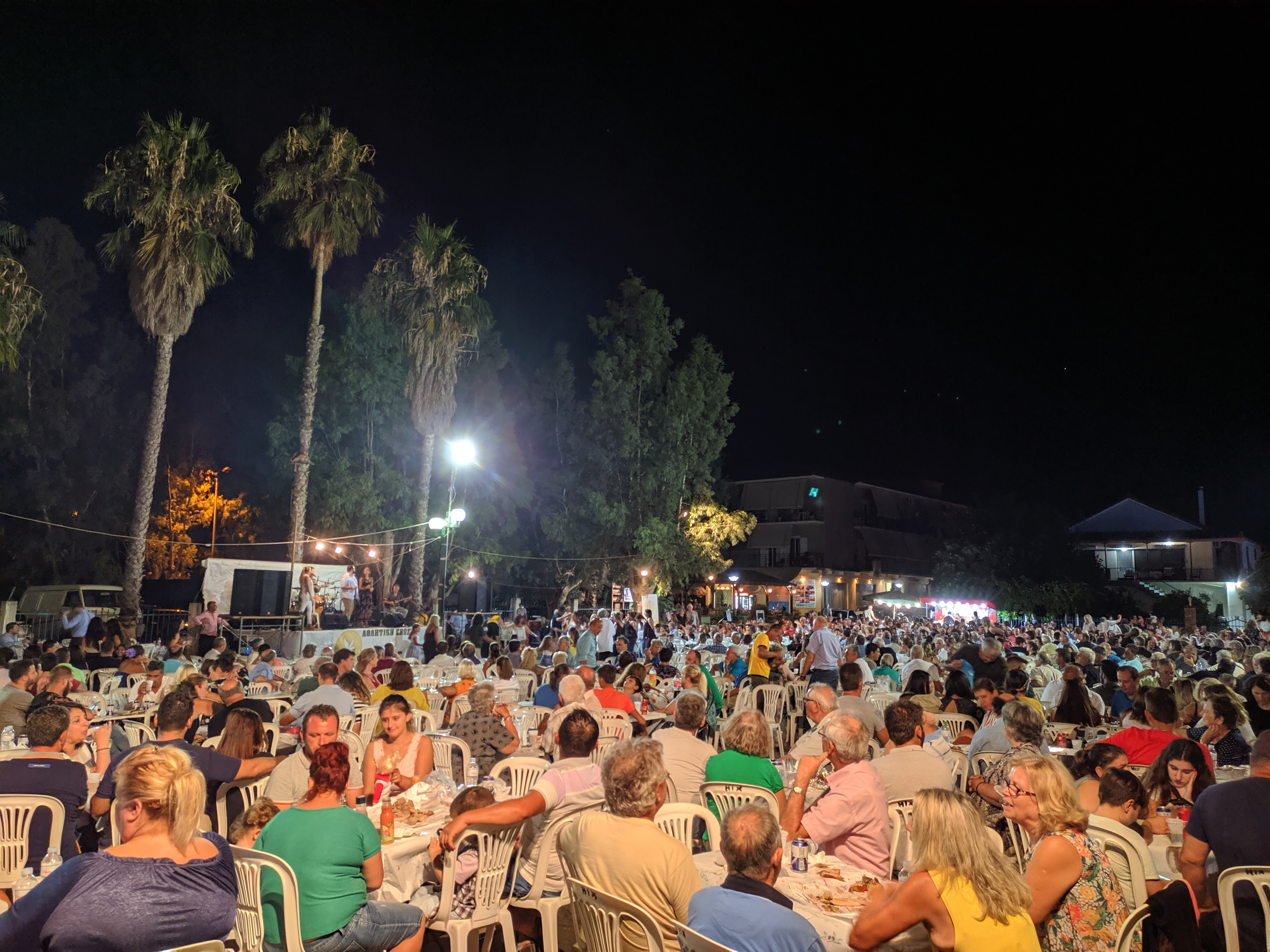 Greek festival in Agios Andreas, Messinia, Greece.